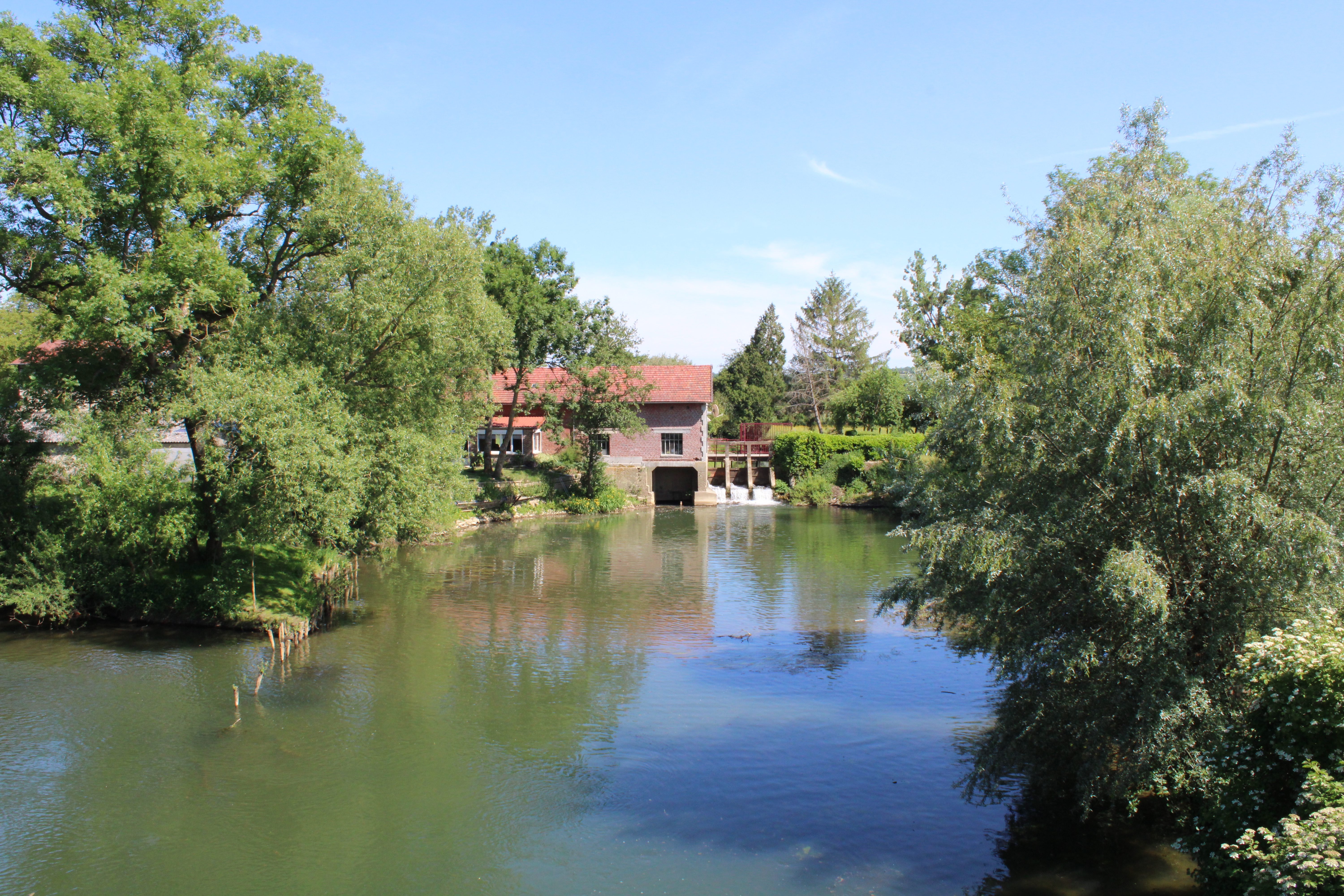 L'église d'Erloy